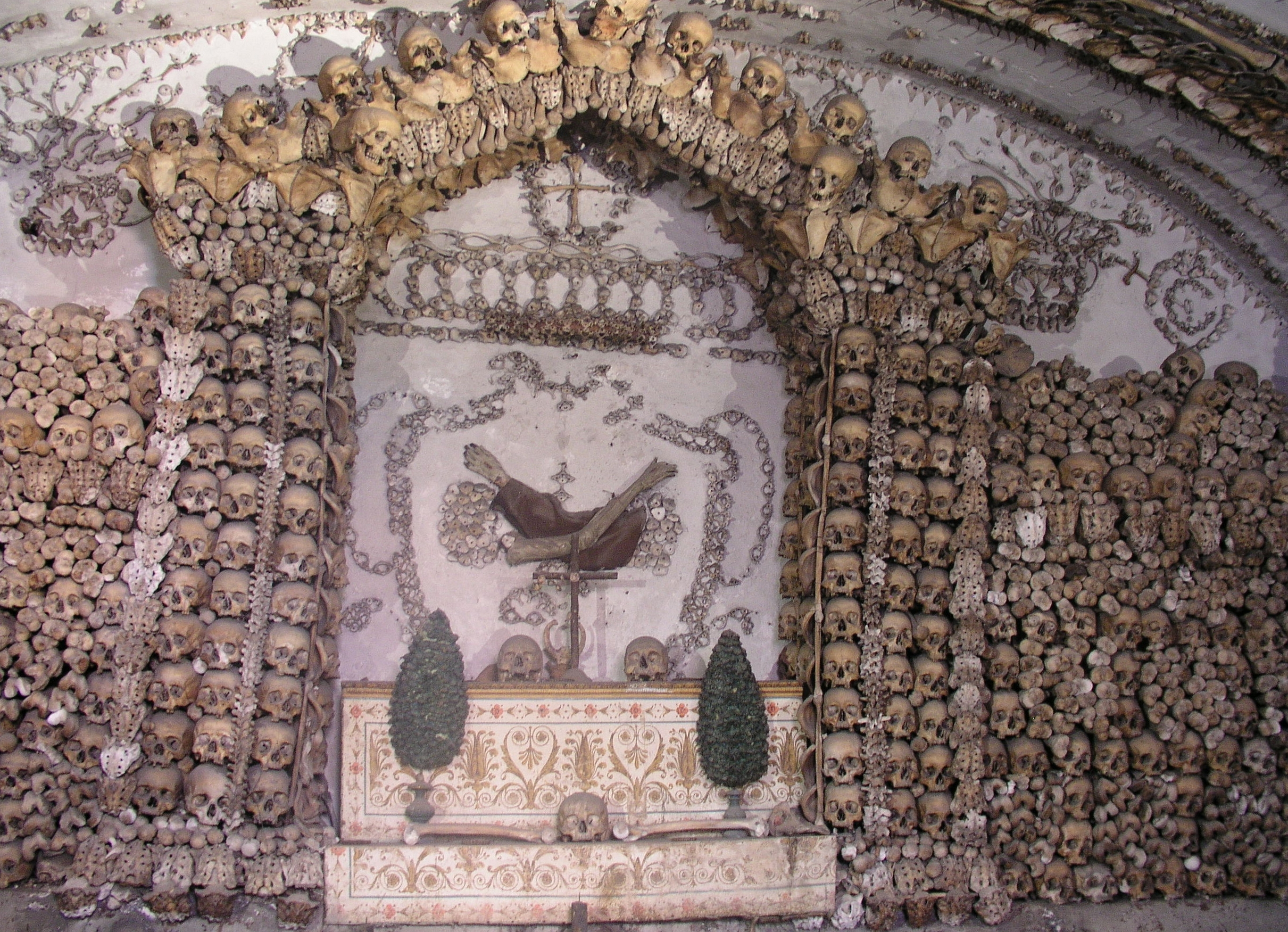 Rom, Santa Maria Immacolata a Via Veneto, Krypta der Kapuziner